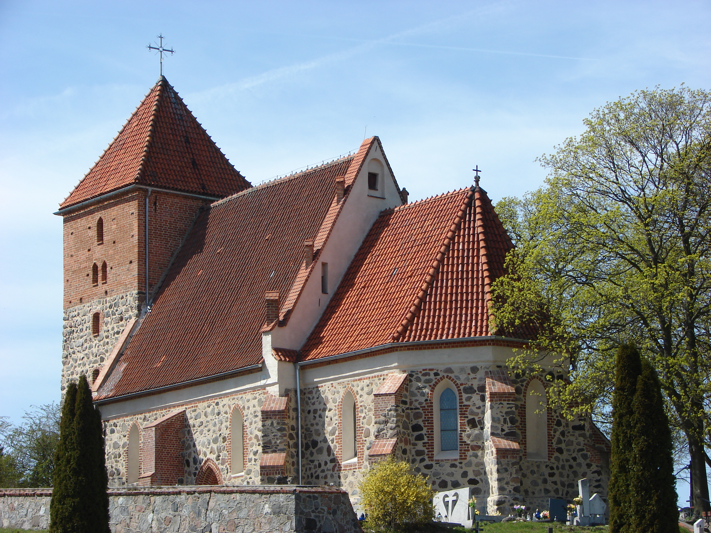 Przeczno, Gmina Łubianka, Kuyavian-Pomeranian Voivodeship. Church of The Holy Cross, built about 1300.